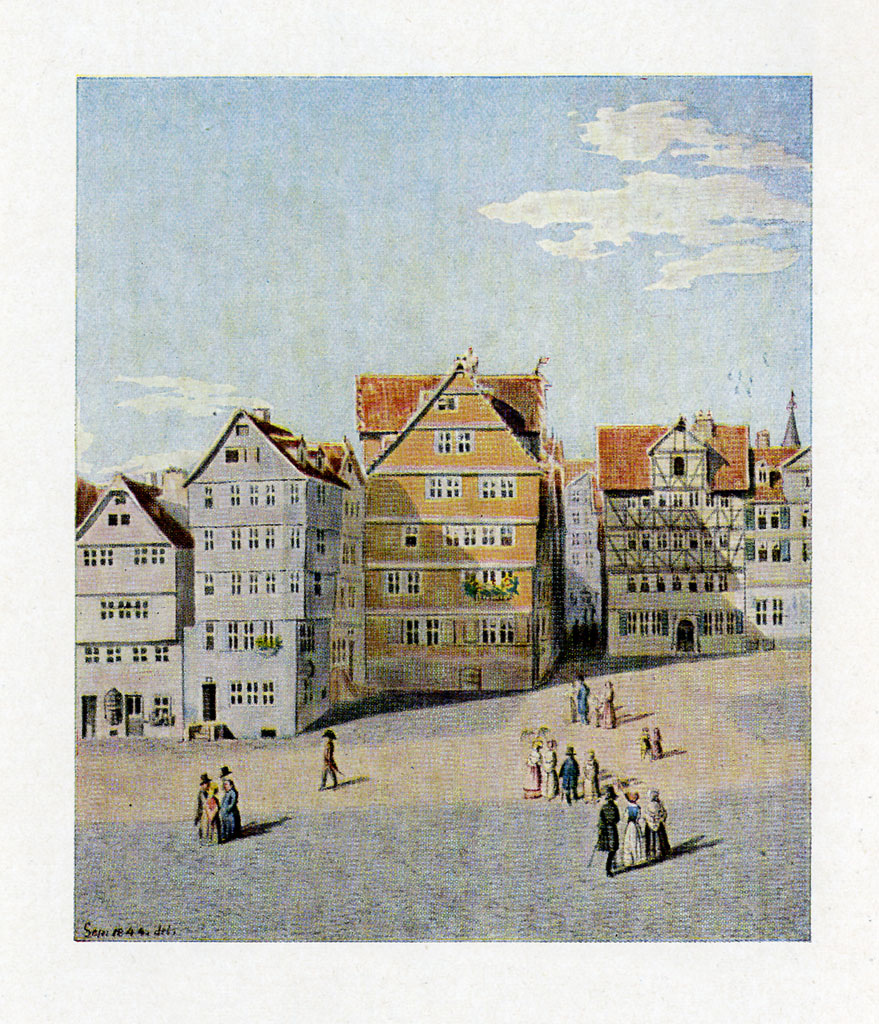 Ansicht des Marställer Platzes mit der Tränkepforte